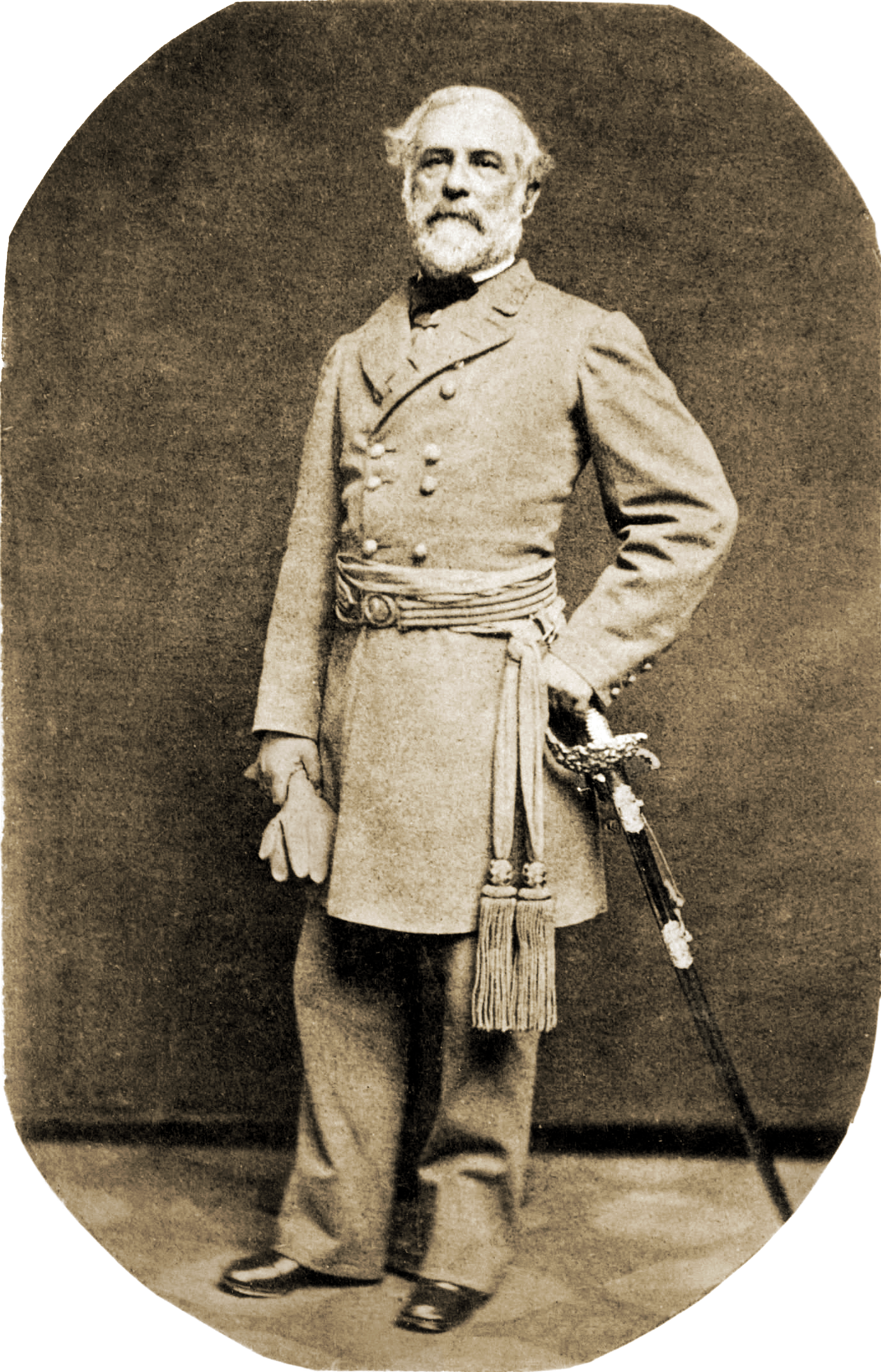 Robert Edward Lee